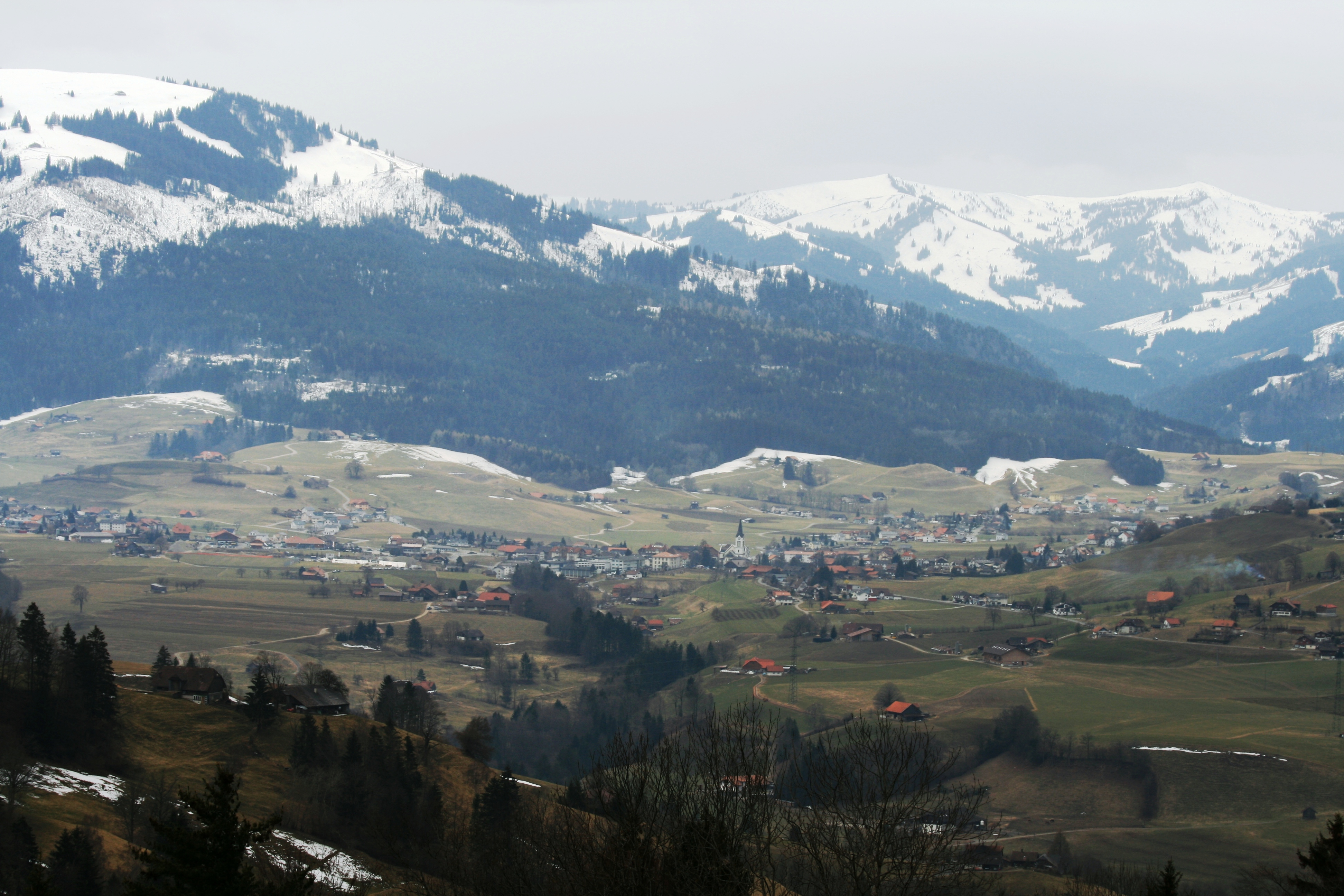 Gemeinden Plaffeien und Oberschrot, Der Tütschbach bildet die Grenze zwischen den beiden Gemeinden, Kanton Freiburg, Schweiz